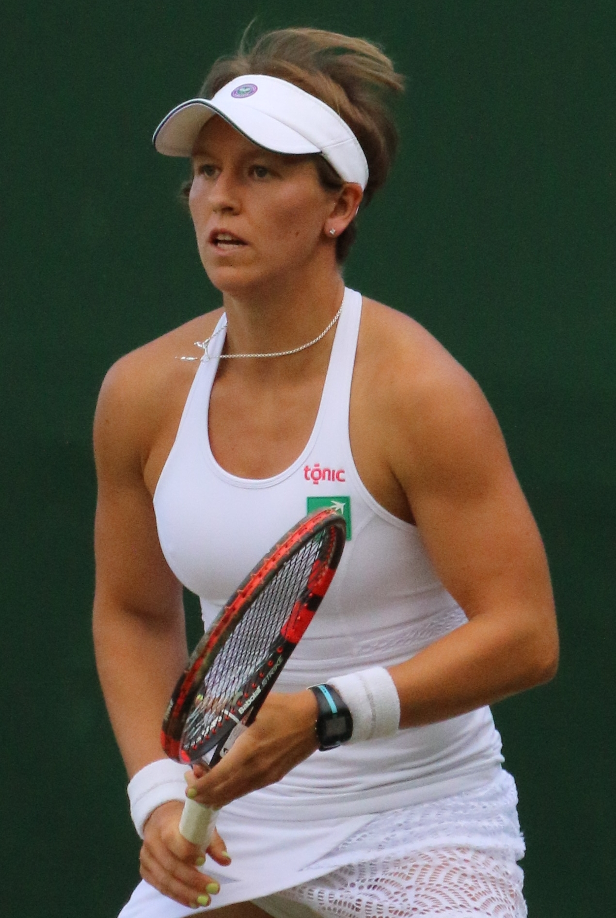 Mestach WM16 (1)